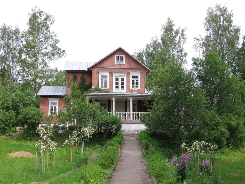 Усадьба путешественника Пржевальского Н. М. (филиал музея-заповедника) (Смоленская область, Демидов, посёлок Пржевальское, Советская улица, 49)